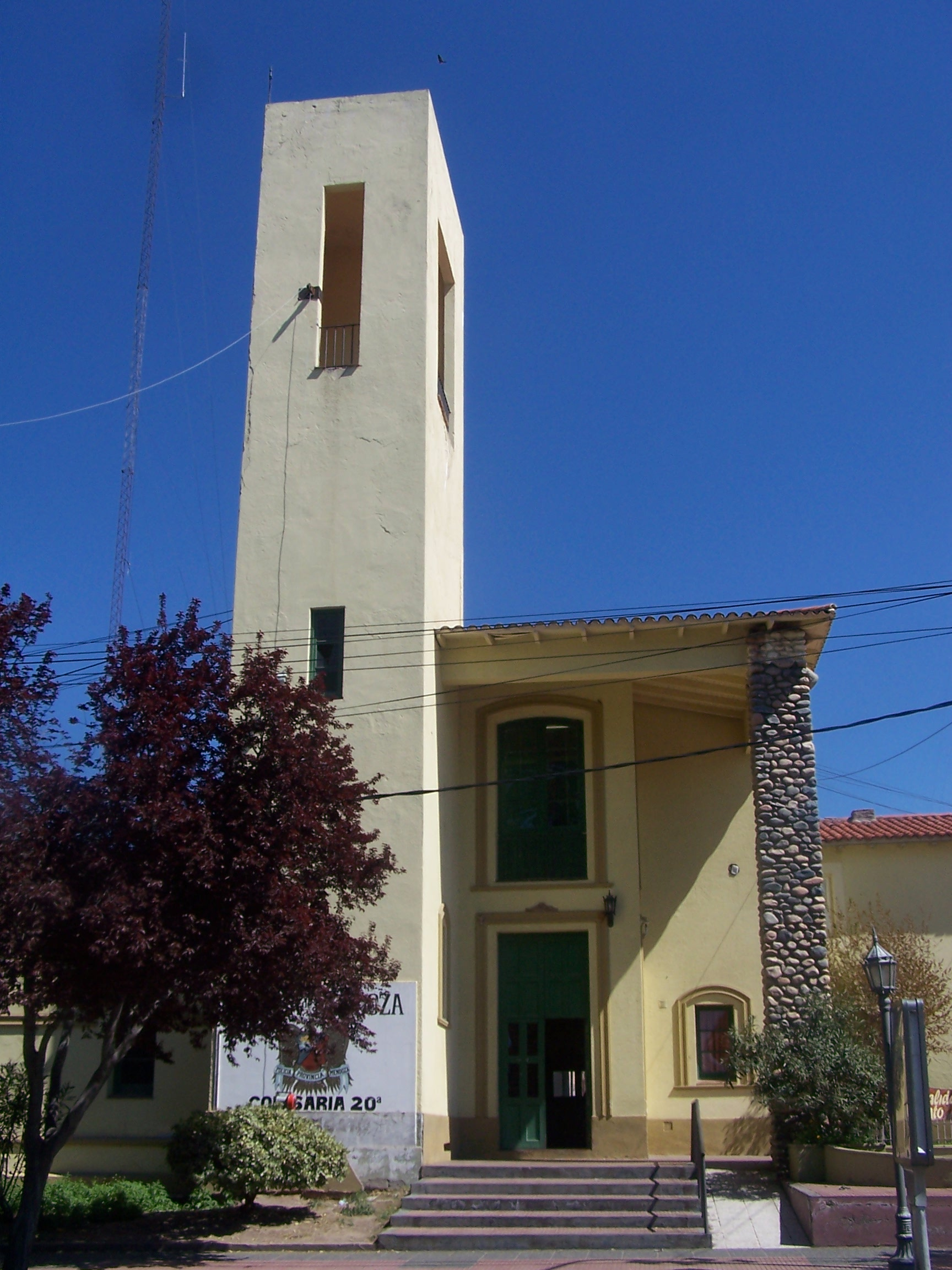 Torreo Edificio Policial Tupungato, monumento histórico.